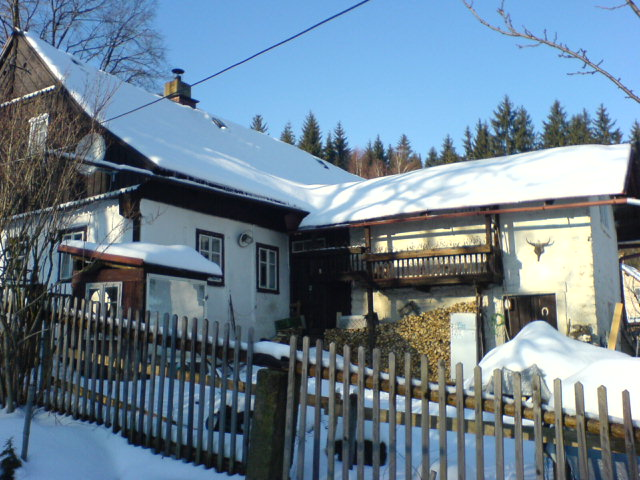 Baráček ležící na Vinici ve kterém žije rodina Brožkova akorát z jiného pohledu